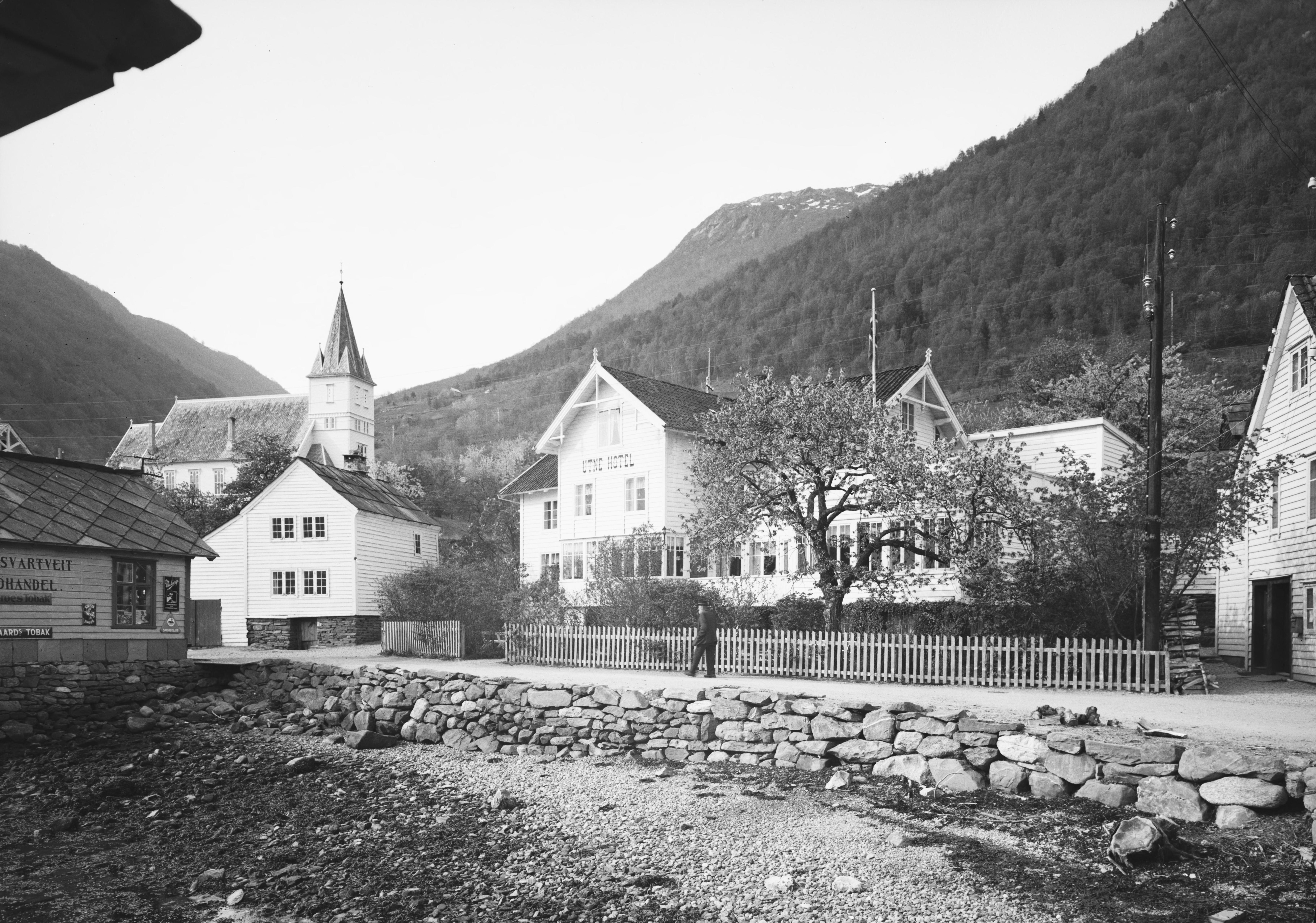 Bildet er hentet fra Nasjonalbibliotekets bildesamling. Anmerkninger til bildet var: Fotograf ukjent. Hardanger,Utne, Ullensvang, Hordaland